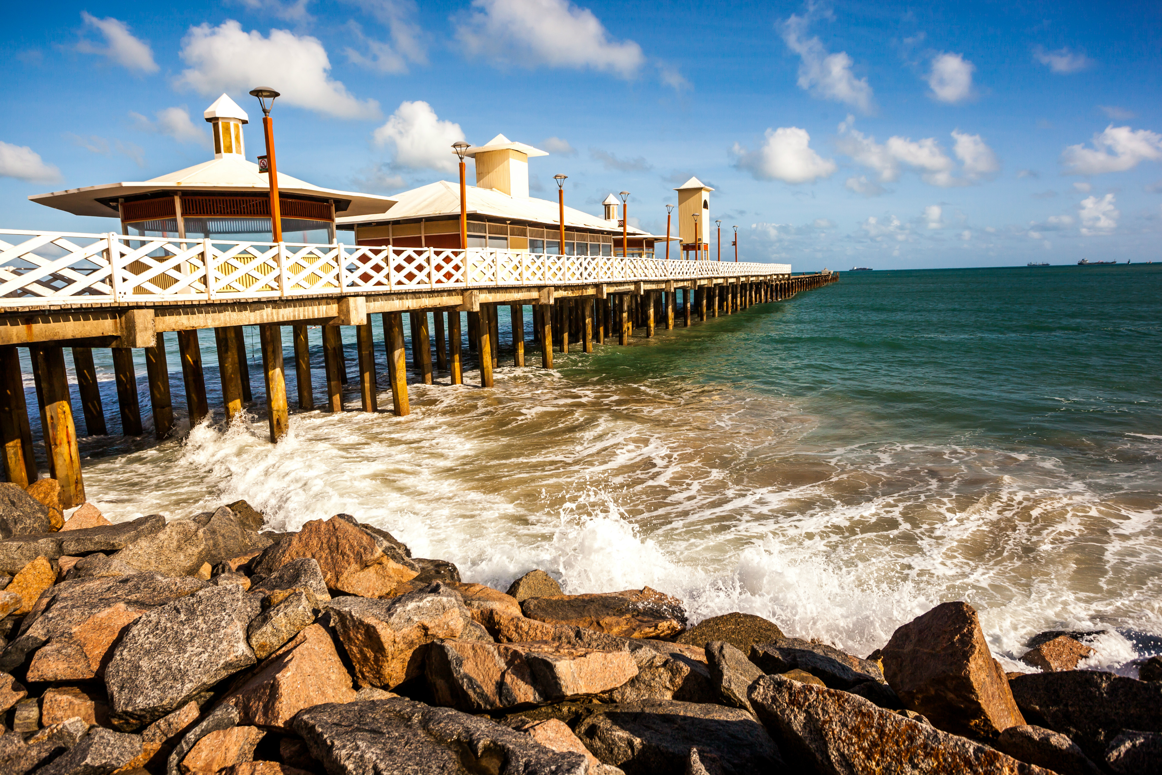 Ponte dos Ingleses